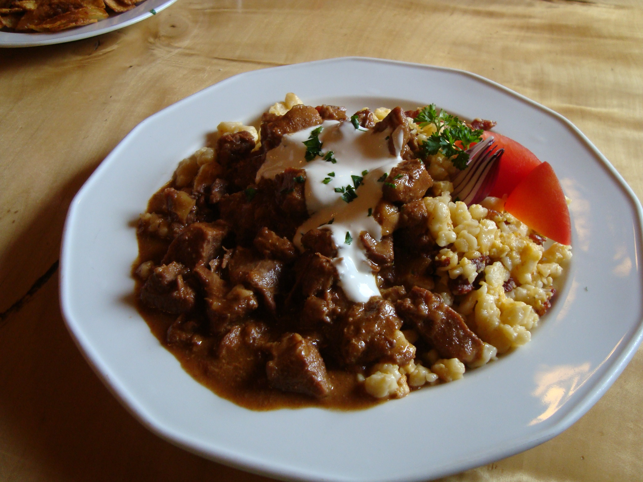 Marhapörkölt nokedlivel, tejföllel